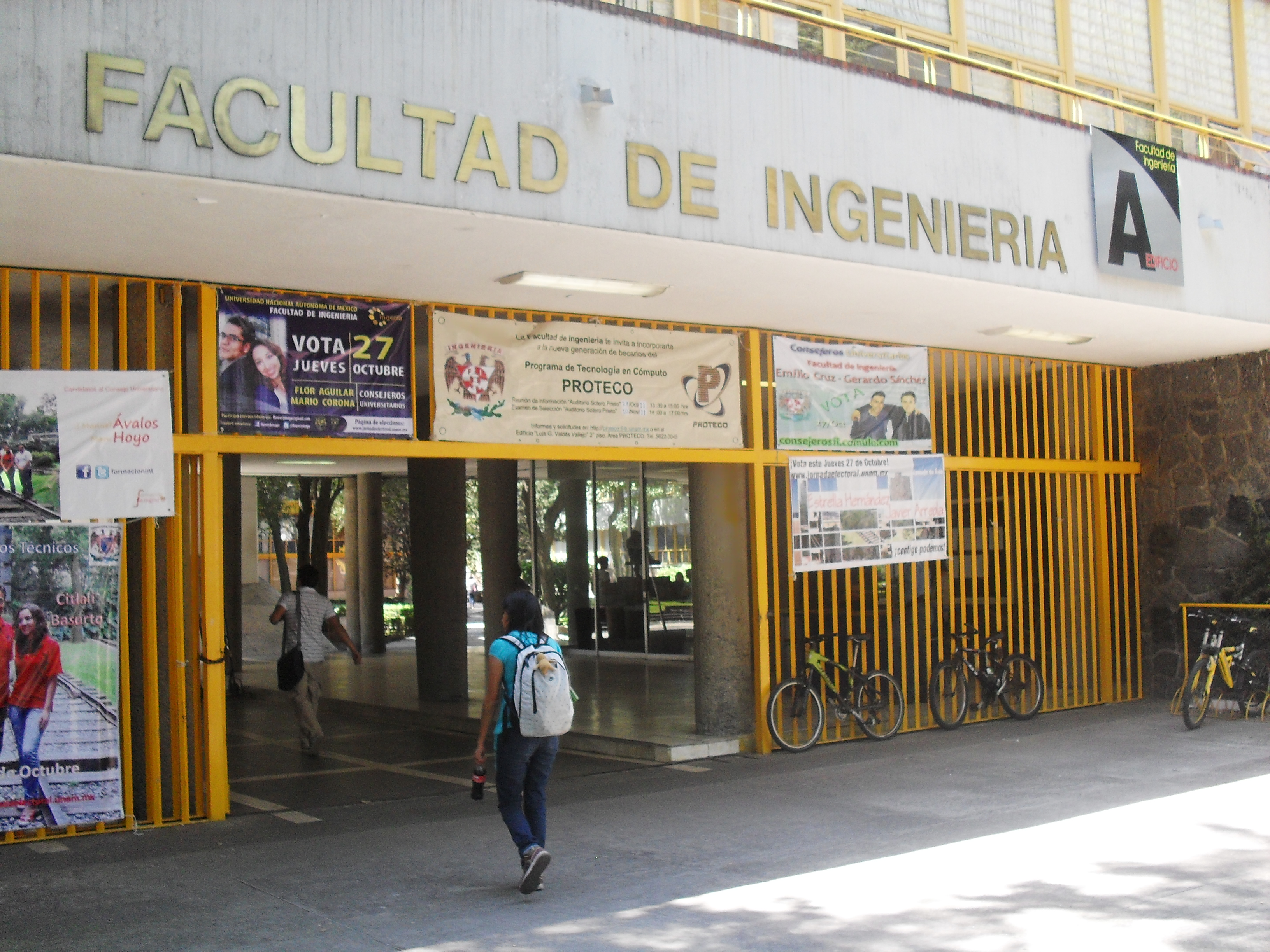 Entrada del Edificio principal de la Facultad